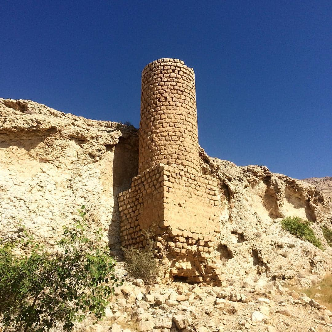 آسياب آبى و قدیمی عسلویه